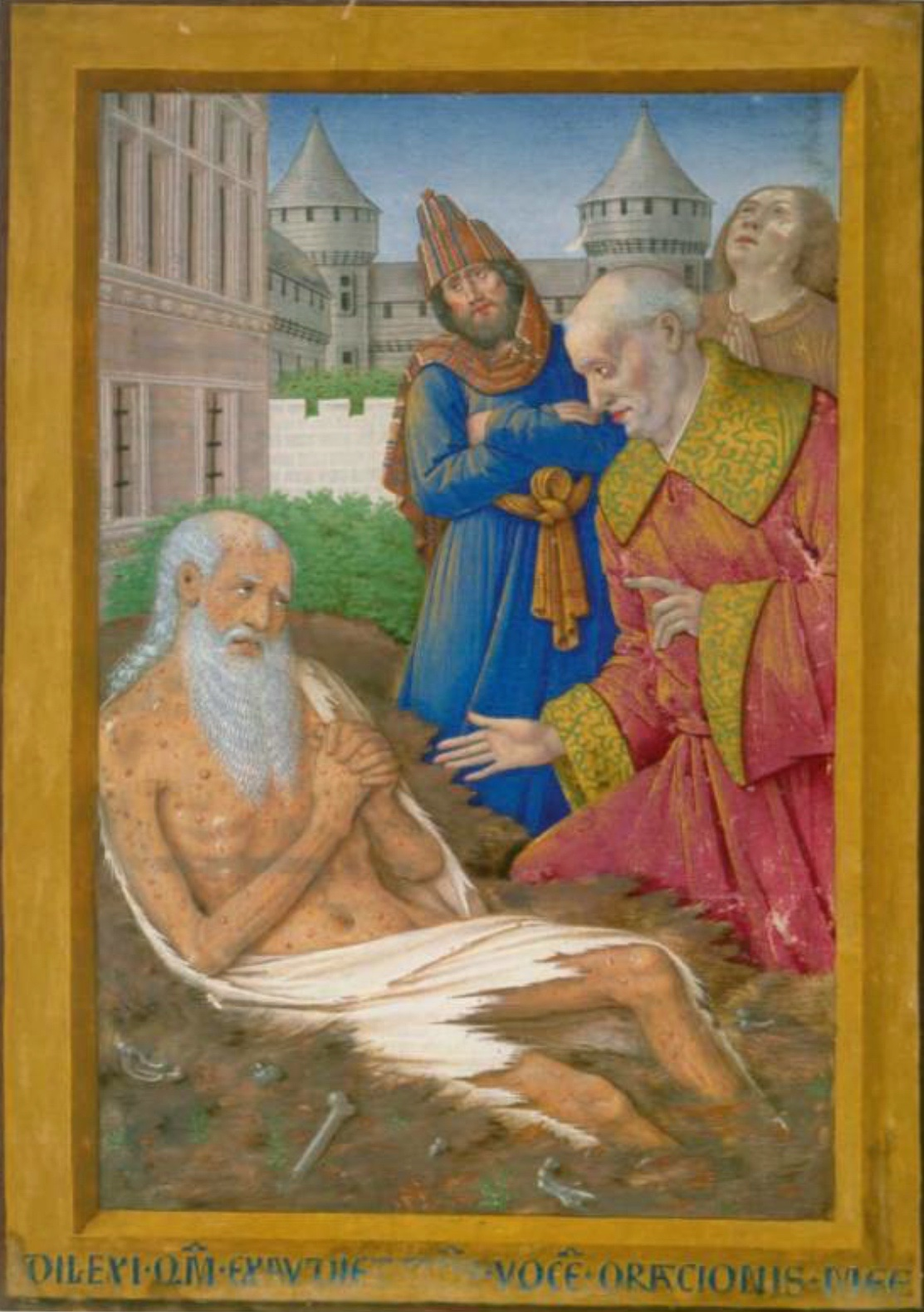 Heures Louis XII - Job sur son tas de fumier et ses amis